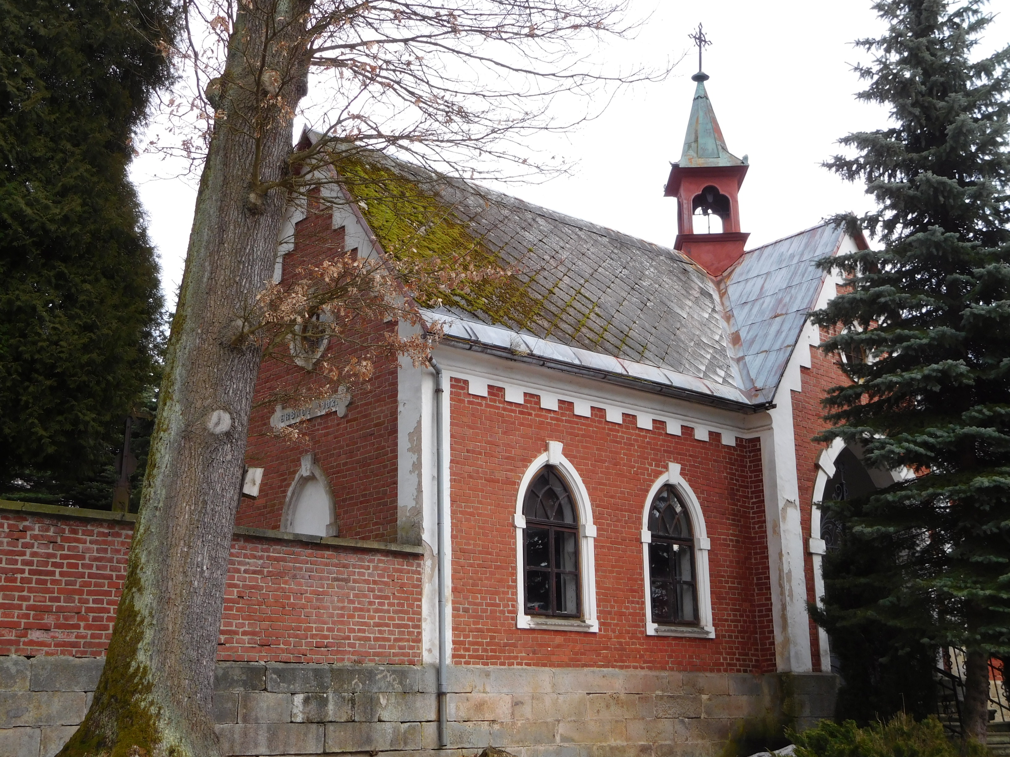 Černý Důl - hřbitovní kaple